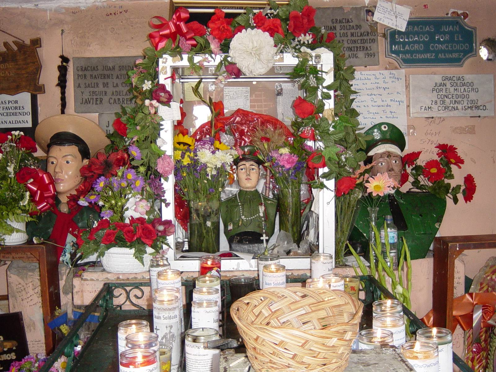 Juan Soldado La fotografía fue tomada por el usuario Scalif en el panteón municipal no.1 de Tijuana, Baja California, en la tumba del soldado Juan Castillo Morales, conocido como Juan Soldado. Fotografía tomada por el usuario Scalif en Tijuana, Baja California. El usuario declara que la fotografía es de su propiedad y autoriza el uso de la imagen bajo los terminos de documentación libre a Wikipedia. Se autoriza la copia, la distribución y la modificación de este documento bajo los términos de la licencia de documentación libre GNU, versión 1.2 o cualquier otra que posteriormente publique la Fundación del Software Libre (Free Software Fundation); sin secciones invariantes (Unvariant Sections), textos de portada (Front-Cover Texts), ni textos de contraportada (Back-Cover Texts). Se incluye una copia en inglés de esta licencia en el artículo Text of the GNU Free Documentation License.